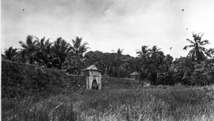 Foto. De buitenmuur van het fort Kajeli op het eiland Buru